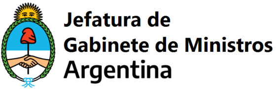 Jefatura de Gabinete de Ministros